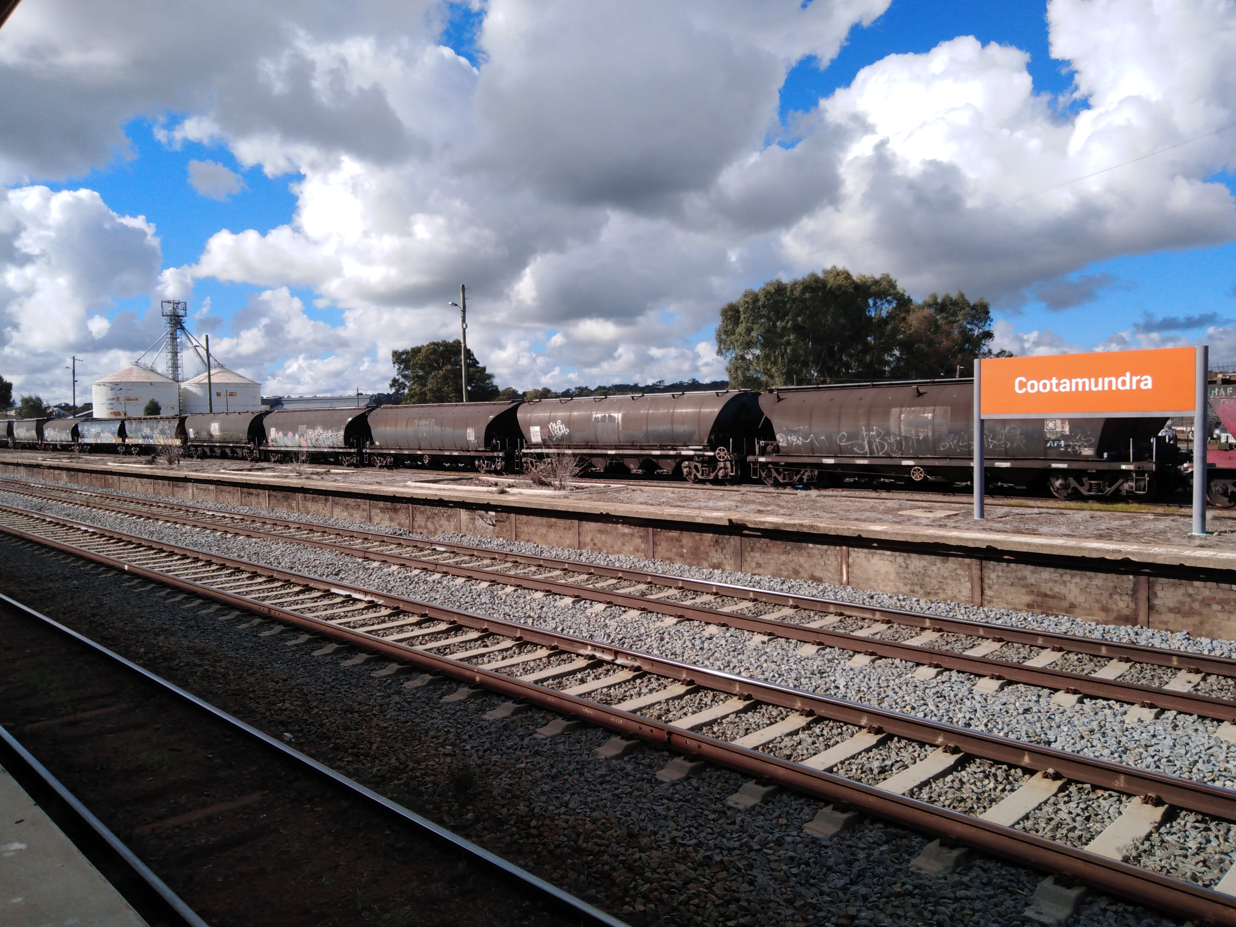 Estación de tren de Cootamundra